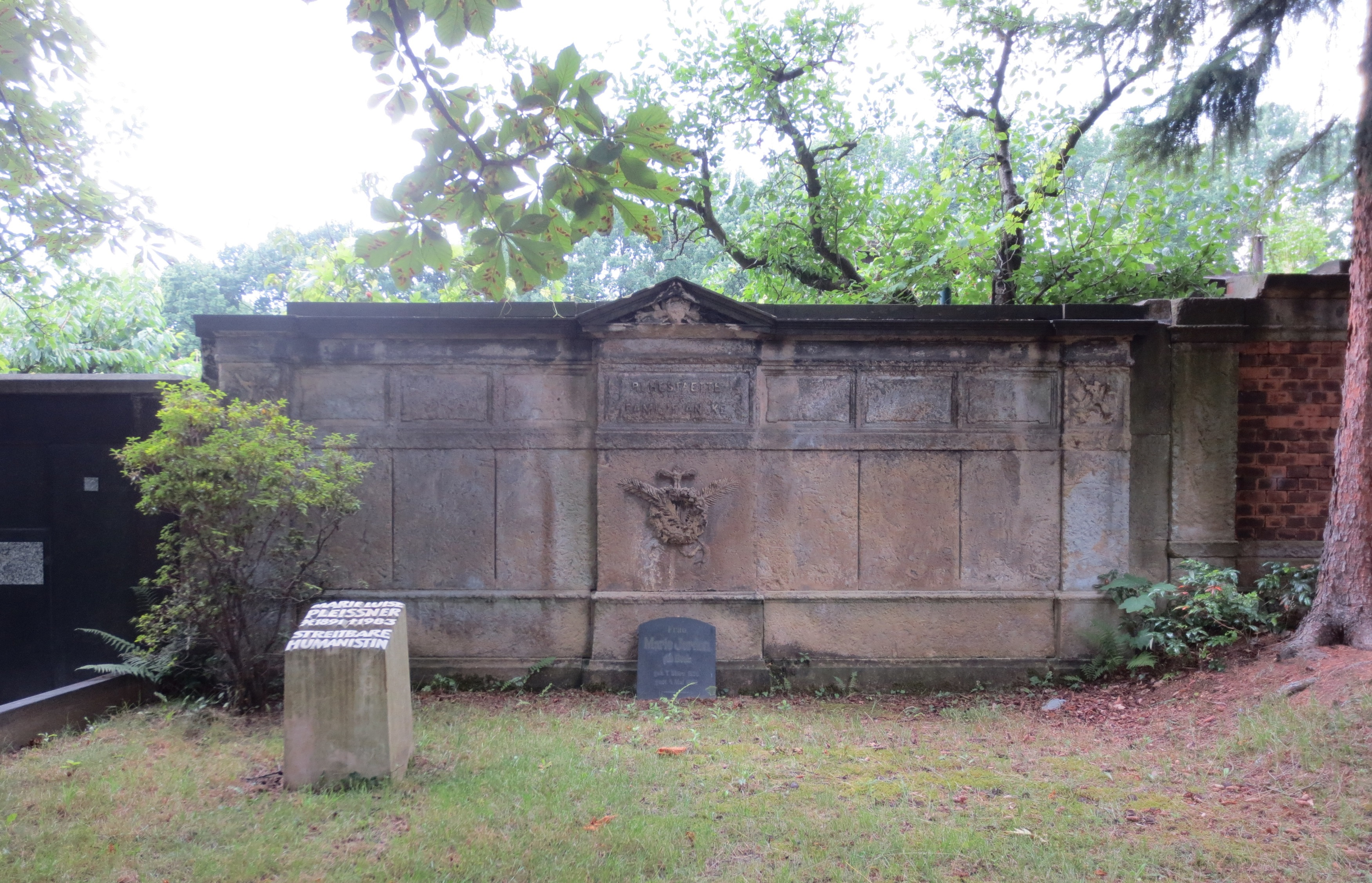 Ruhestätte Familie Franke. Ruhestätte Marie Luise Pleissner. Ruhestätte andere. Teil der Sachgesamtheit Nikolaifriedhof Chemnitz Altendorf.